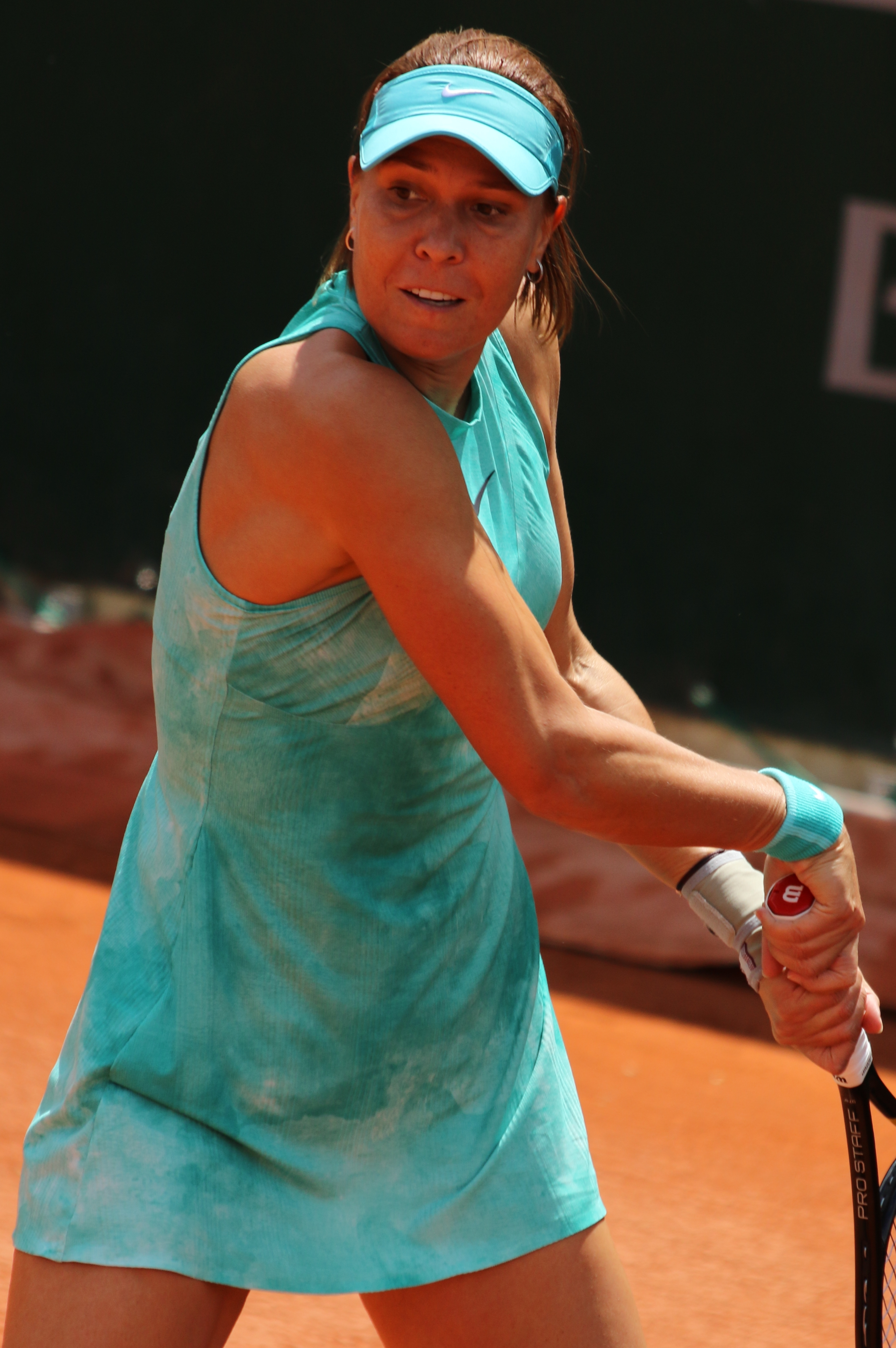 Hradecka RG19 (10)